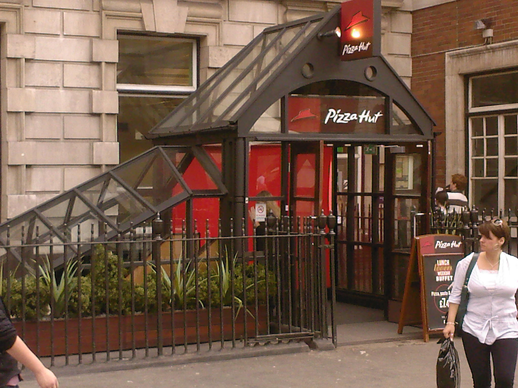 An underground Pizza Hut restaurant at 1A Henrietta Street Covent Garden Westminster London WC2E 8PP